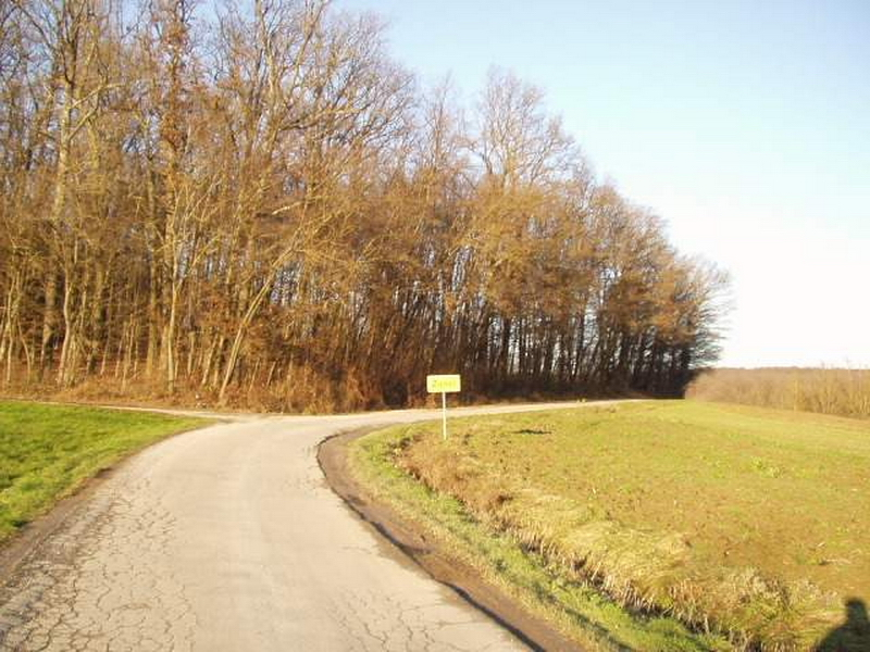 Žunci - Entrance